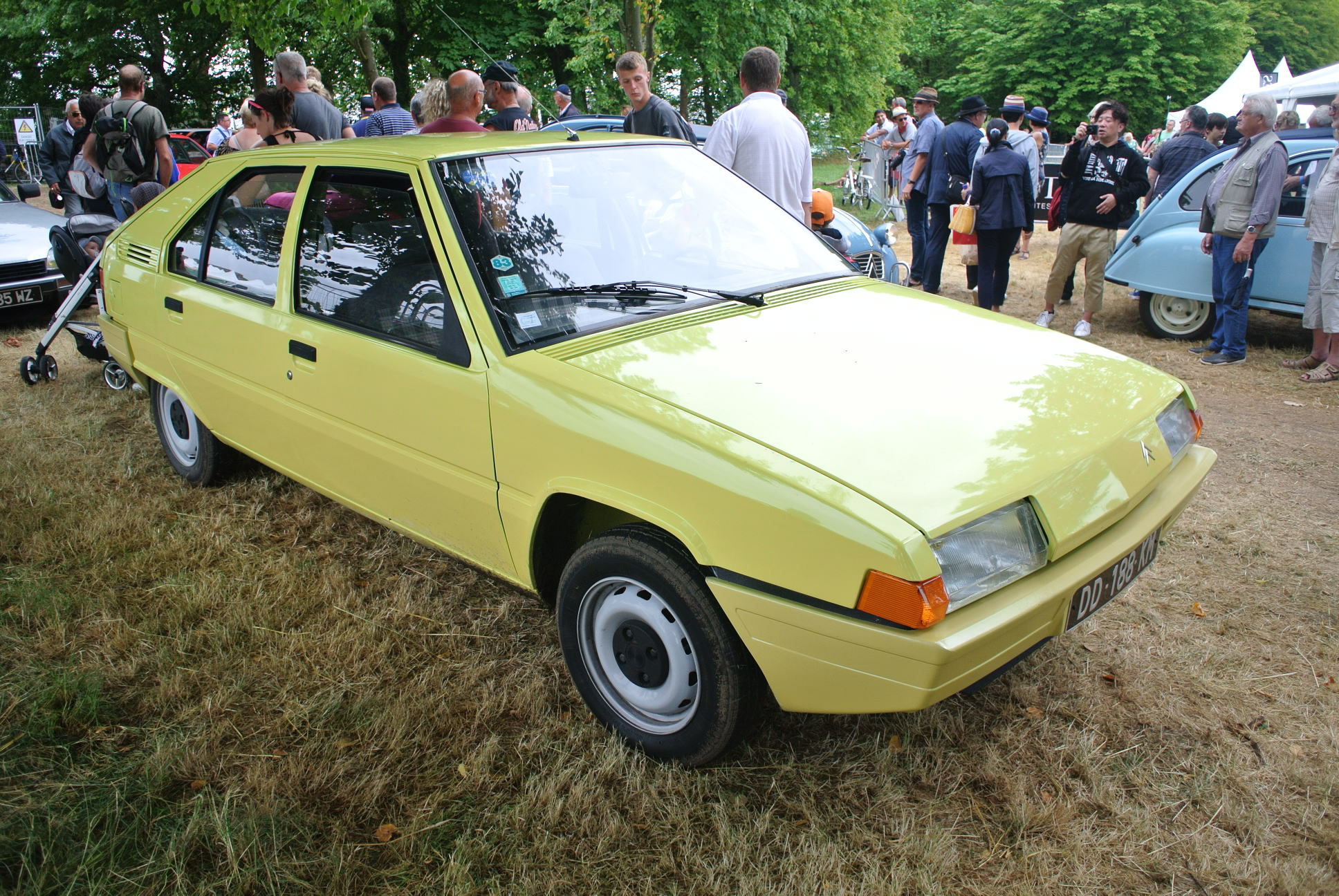 Une BX dans une originale couleur jaune cédrat